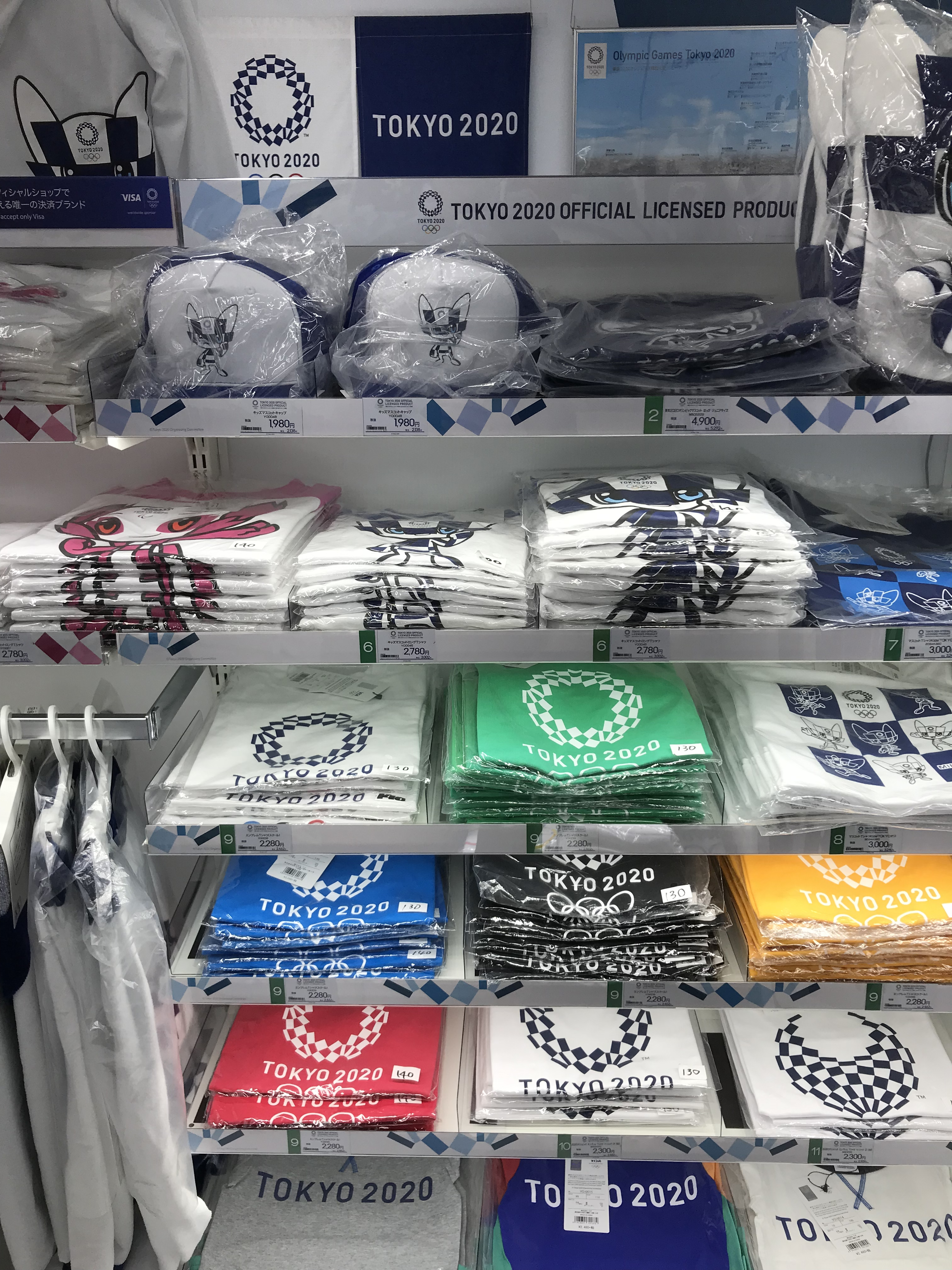 ビックカメラ赤坂見附駅店